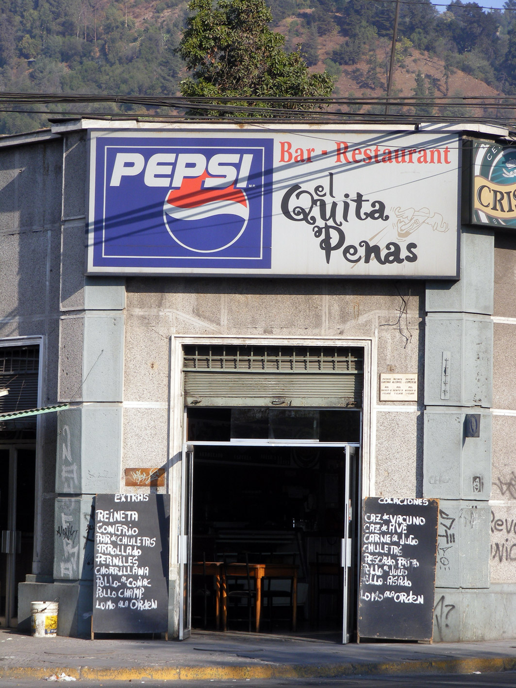 Fachada del Bar-restaurante El Quitapenas